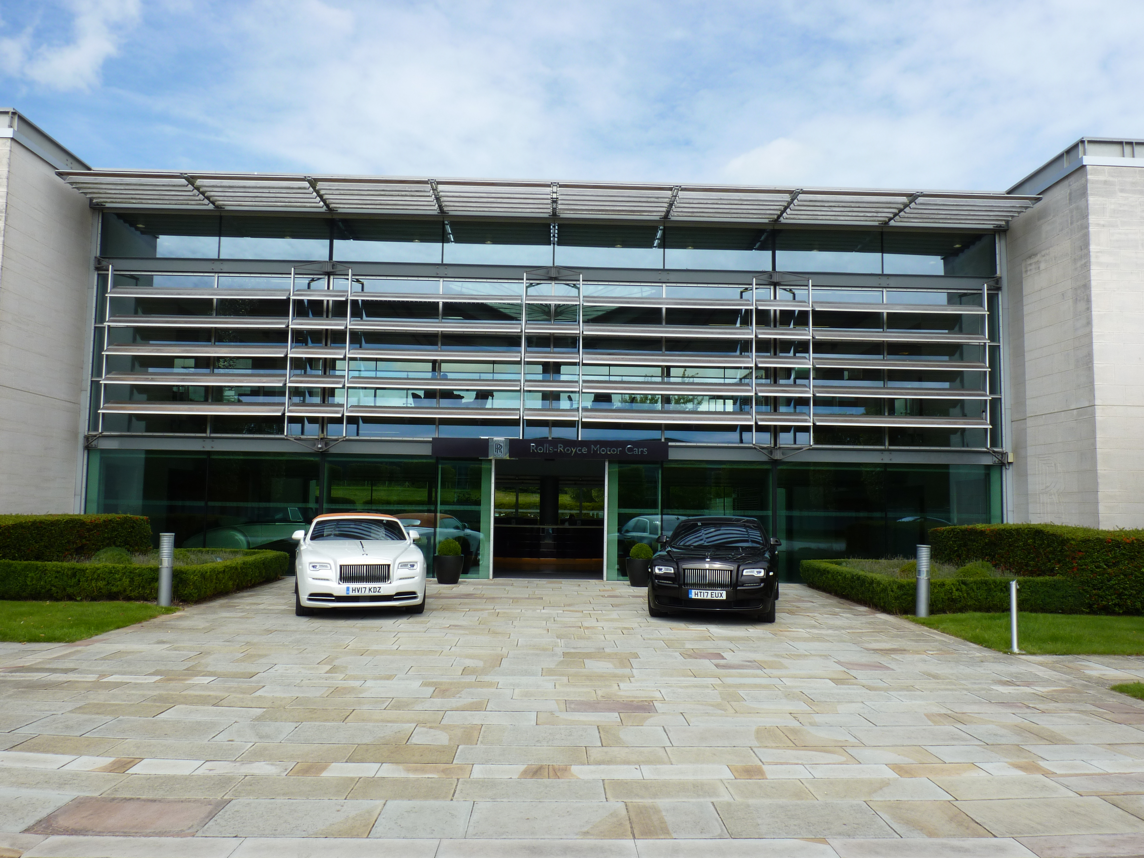 Show Room Rolls-Royce à l'usine Goodwood (2017)